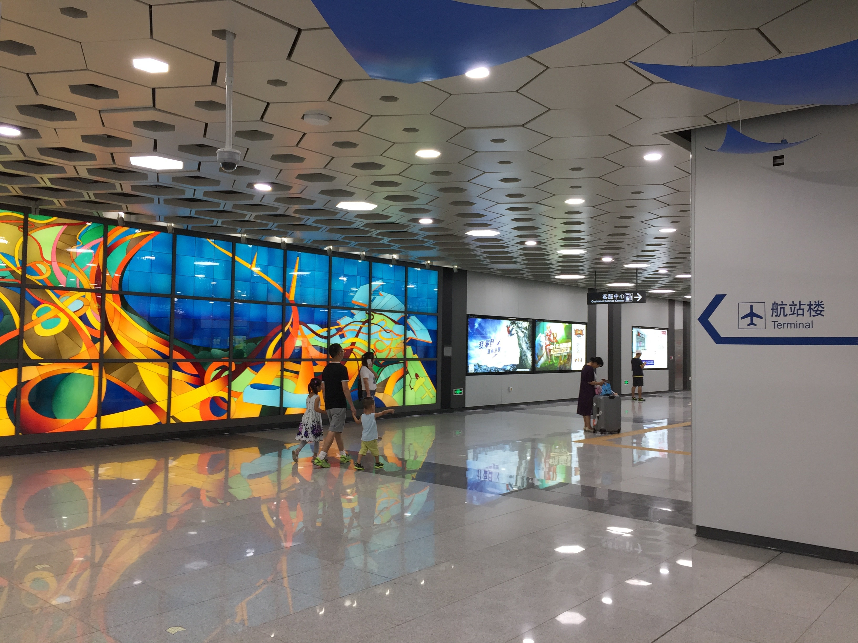 Shenzhen Metro Line 11